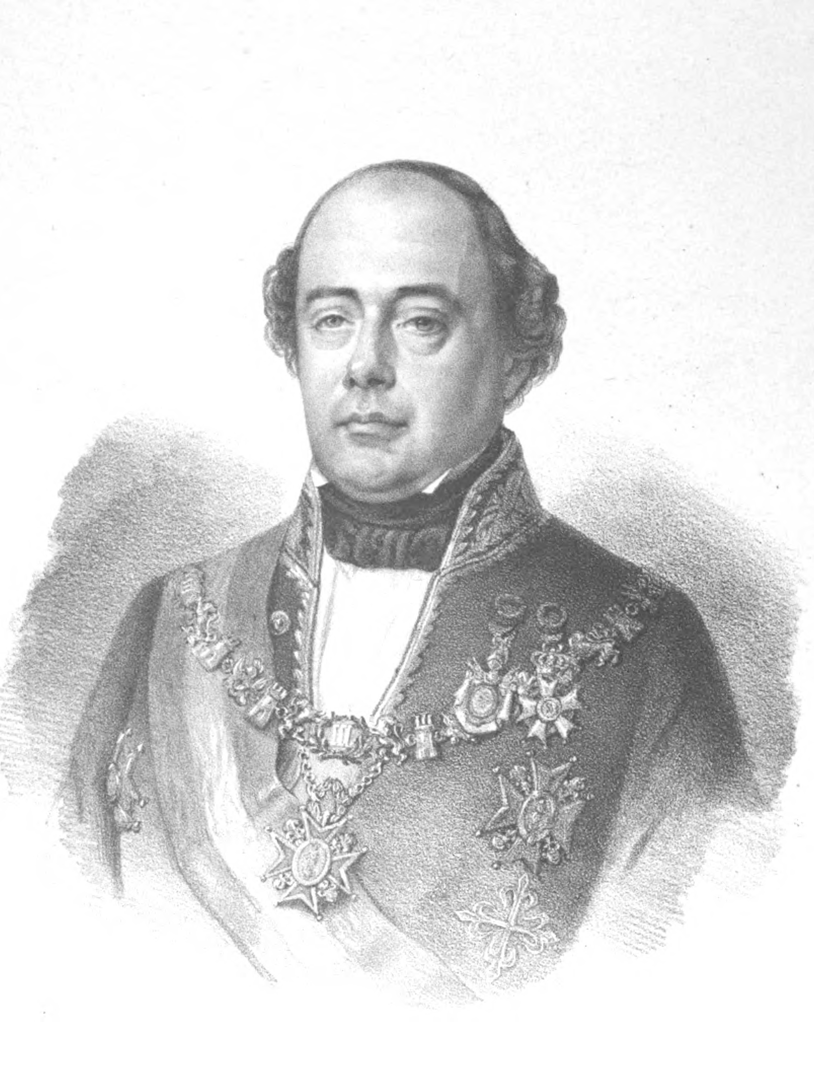 Vicente Pío Osorio de Moscoso y Ponce de León.